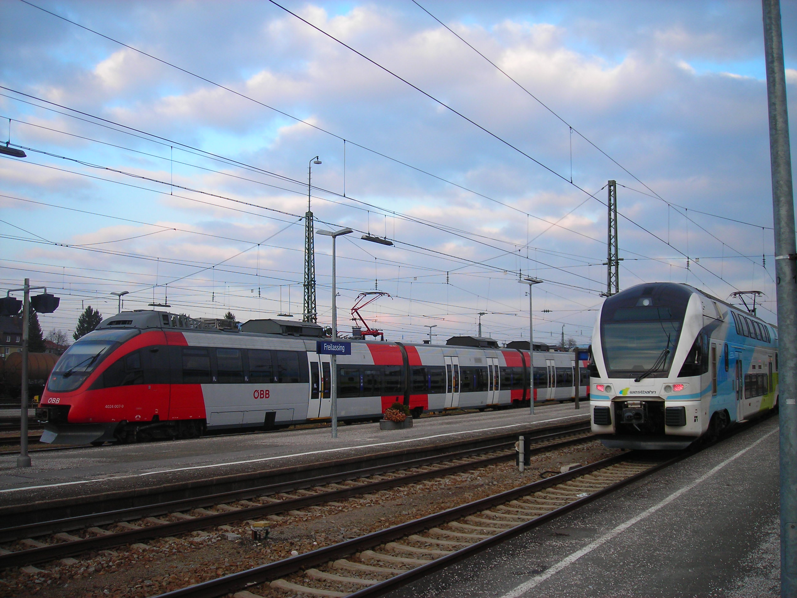 A WESTbahn GmbH motorvonata Freilassing állomáson